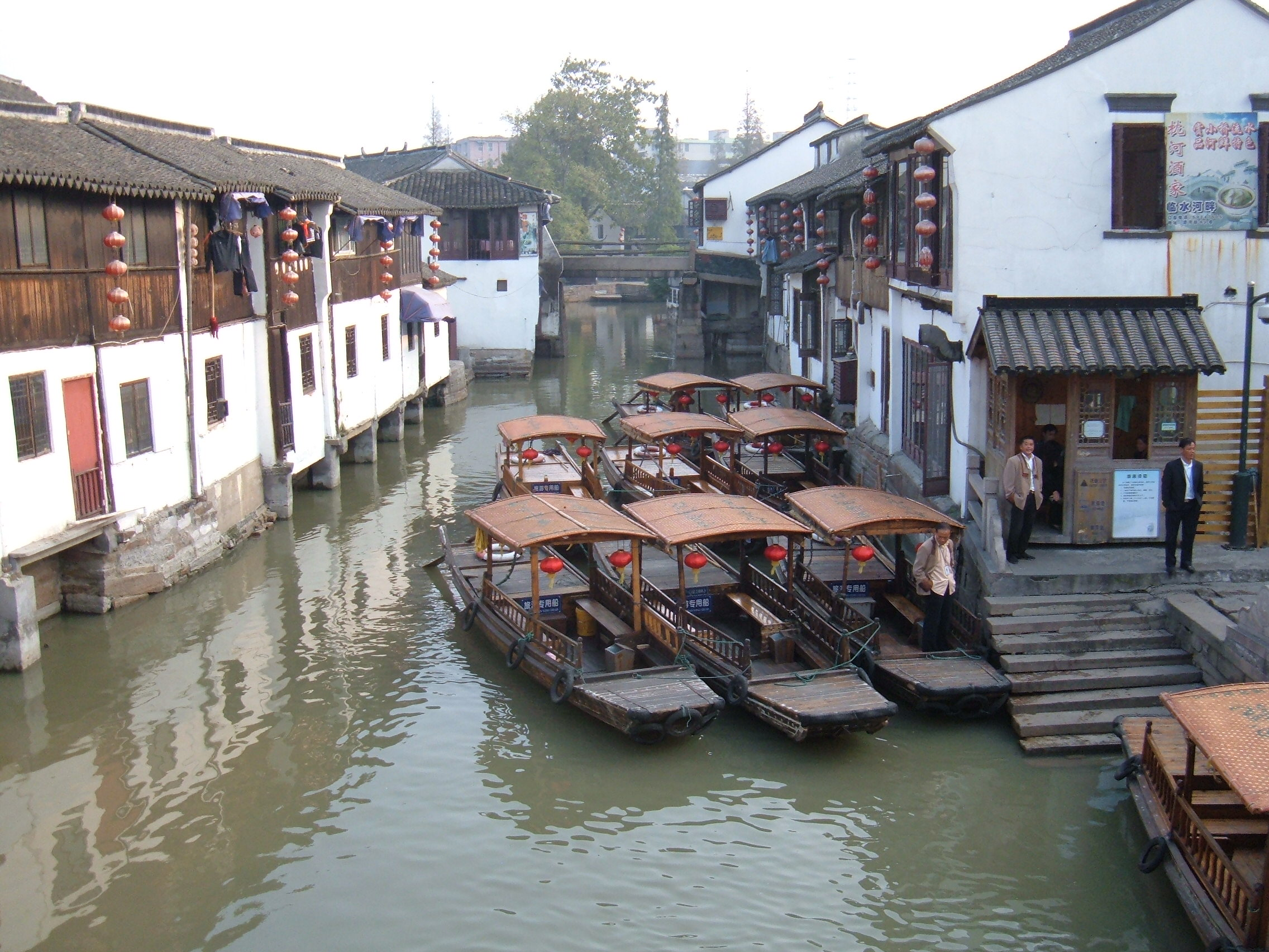 Canal in Zhujiajiao, PRC.